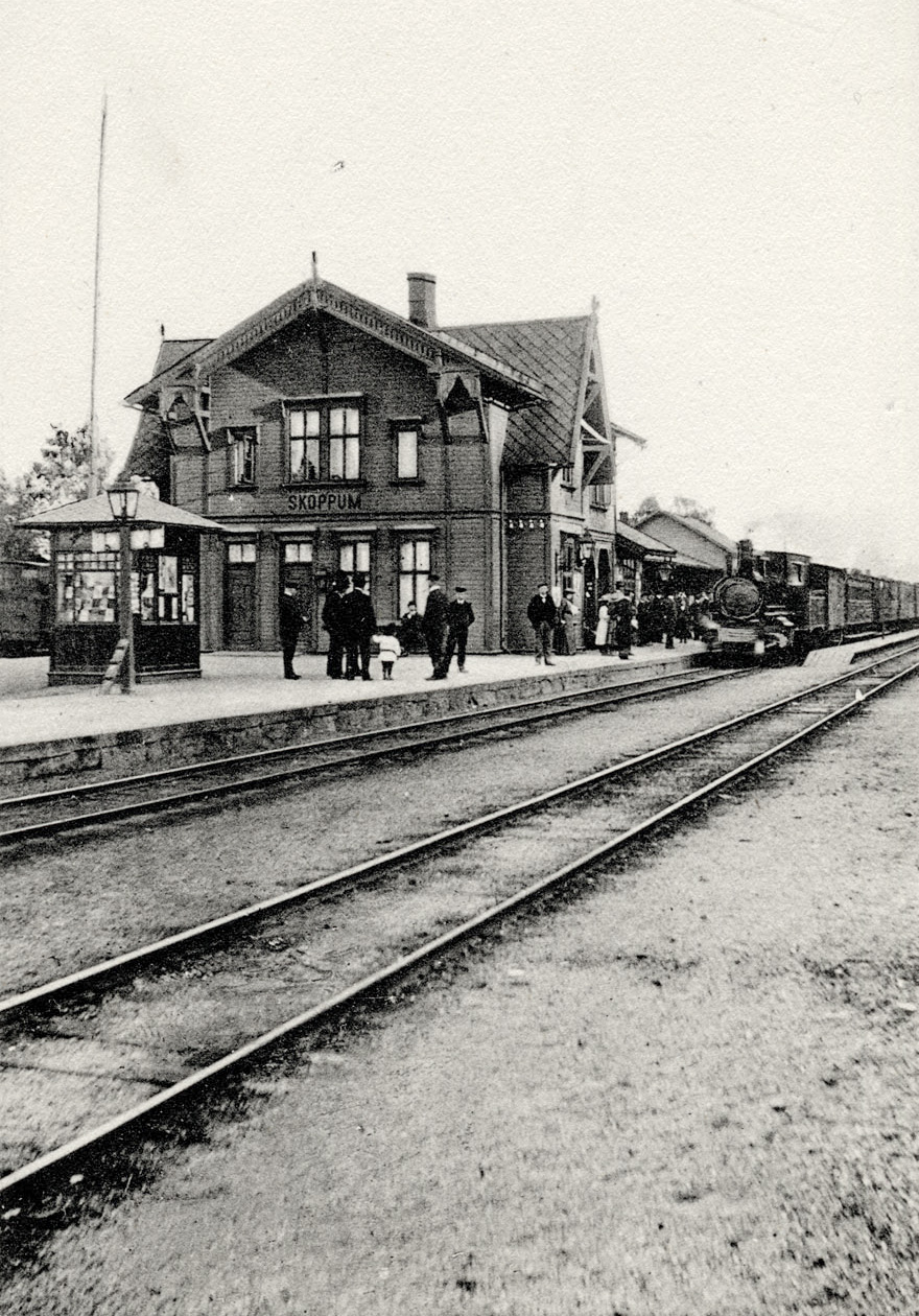 Beskjært versjon av File:Skoppum stasjon postkort 1.jpg Skoppum stasjon på Vestfoldbanen før 1918